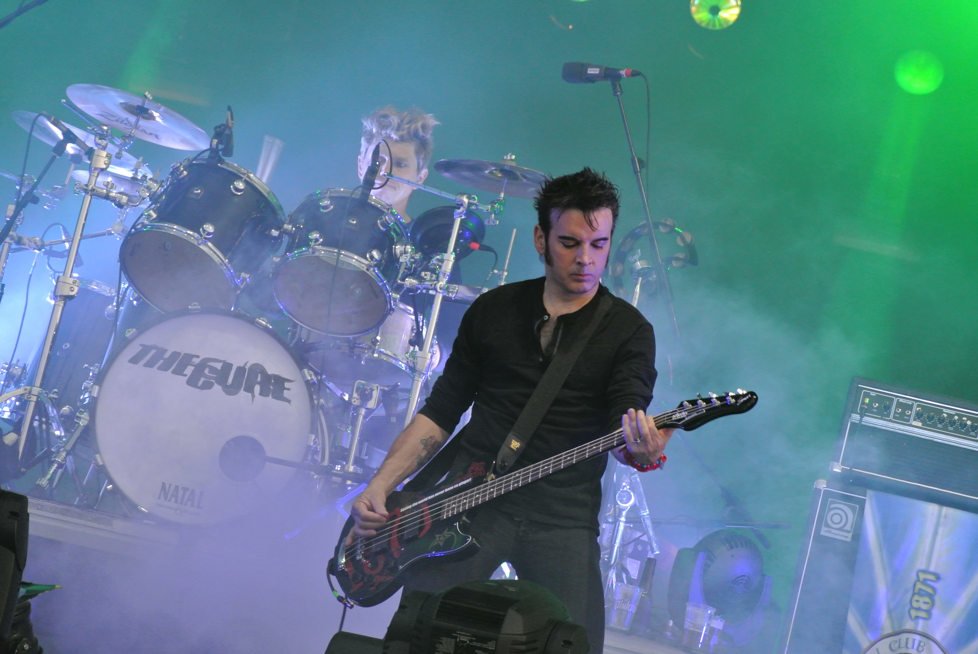 Simon Gallup y Jason Cooper en el concierto del Primavera Sound (Barcelona-2012)